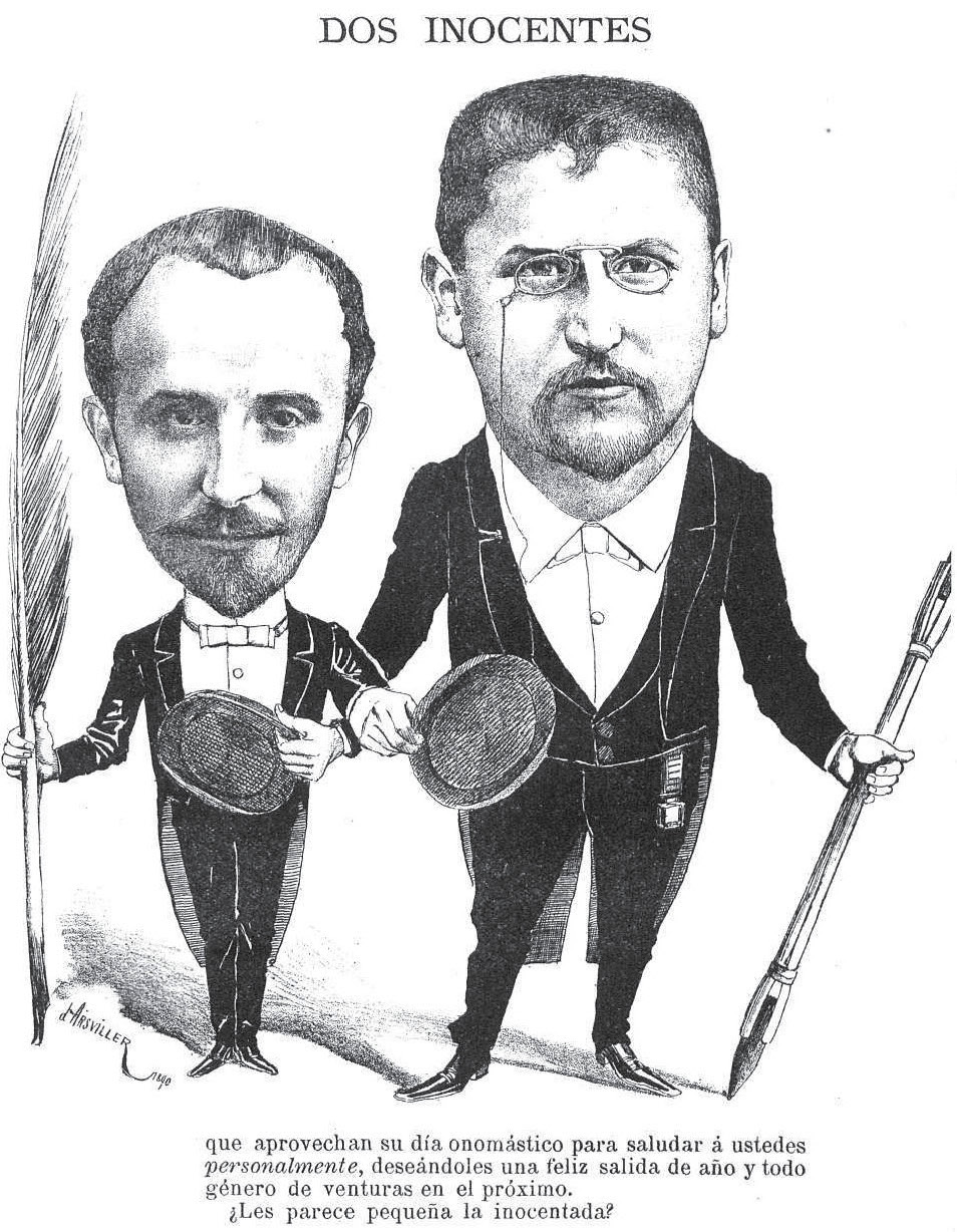 Caricatura de Eustaquio Pellicer y Charles Schutz, director y dibujante del semanario uruguayo Caras y Caretas (1890-1897). El dibujo esta firmado como "d' Arsviller 1890" aunque probablemente su autor sea el mismo Schütz, quien optó por firmar de esa forma en forma jocosa en honor al día de los inocentes.